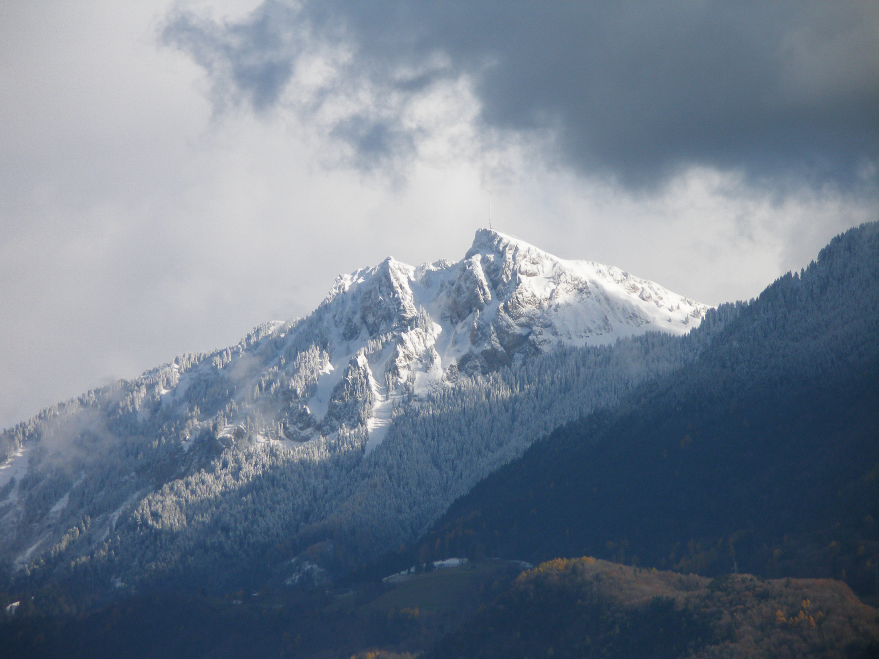 Der Grand Chamossaire, Schweiz. Aus Sicht von der Rhone-Autobahn an der Grenze zwischen Vaud und Wallis